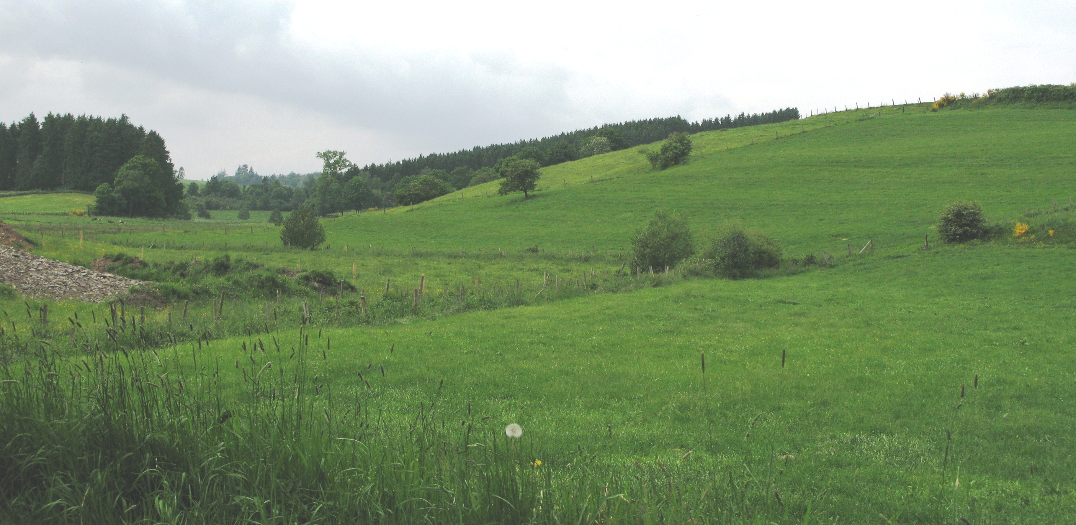 Den Dall vun der Lingserbaach bei Uewerwampech am Mee 2008.